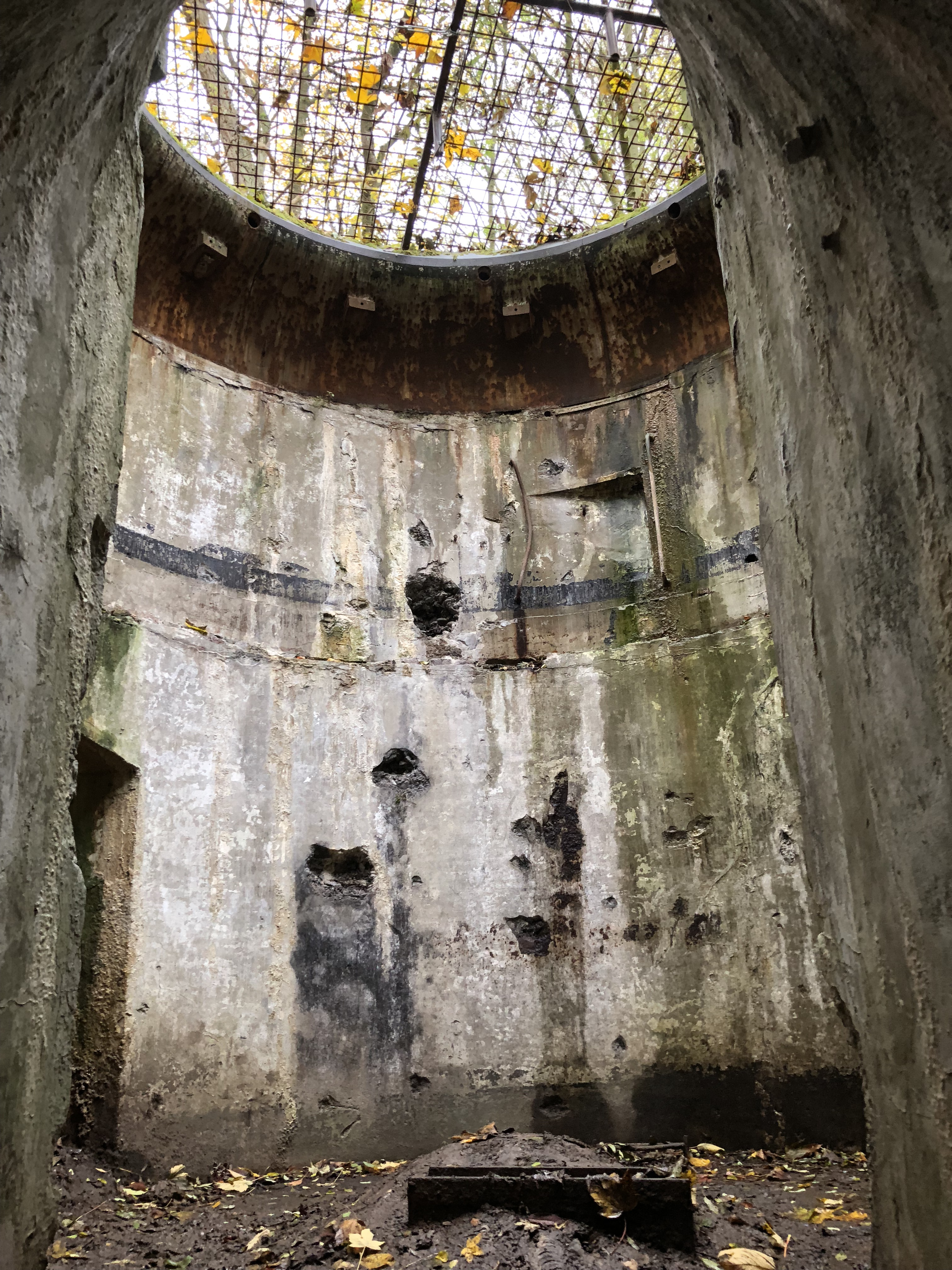 Fort d'Emines lors du centenaire de l'armistice le 11 novembre 2018